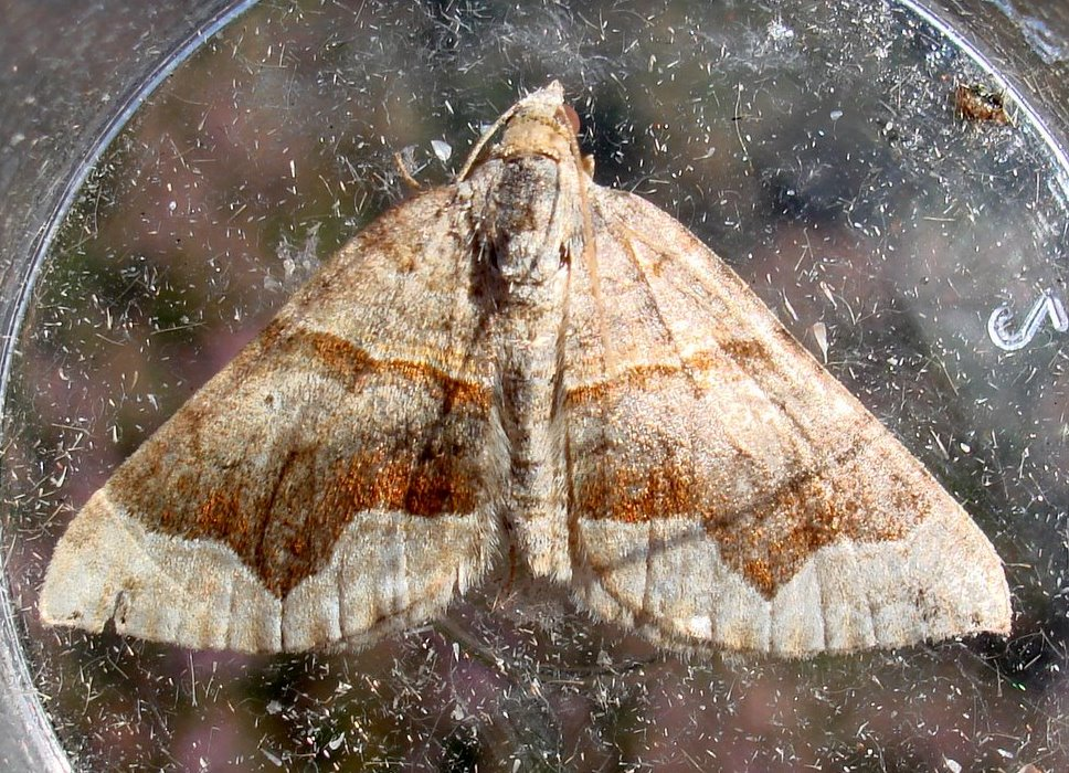 Een tandbandspanner - Scotopteryx moeniata (Scopoli, 1763), gefotografeerd in een heidegebied in Belgisch Limburg.